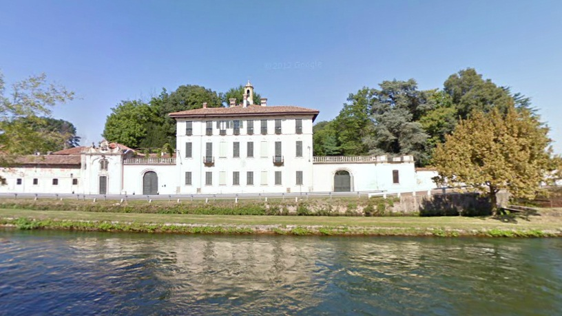 Villa Visconti a Cassinetta di Lugagnano (MI) - Italy